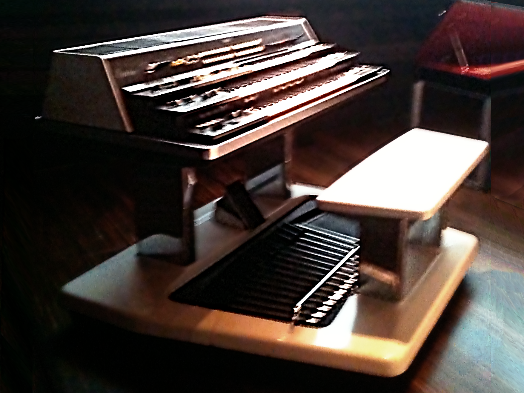 14 Yamaha GX-1, Yamaha Design Masterworks